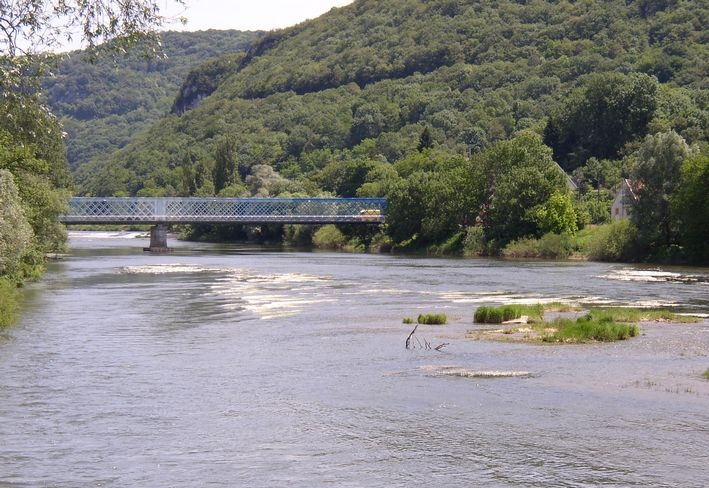 Avanne-Aveney Pont métallique sur le Doubs,Entre Avanne et Aveney Construit en 1893. On remarquera que les renoncules d'eau (Ranunculus aquatilis) sont en fleurs. ( Photo juin 2005) (Photo JL)